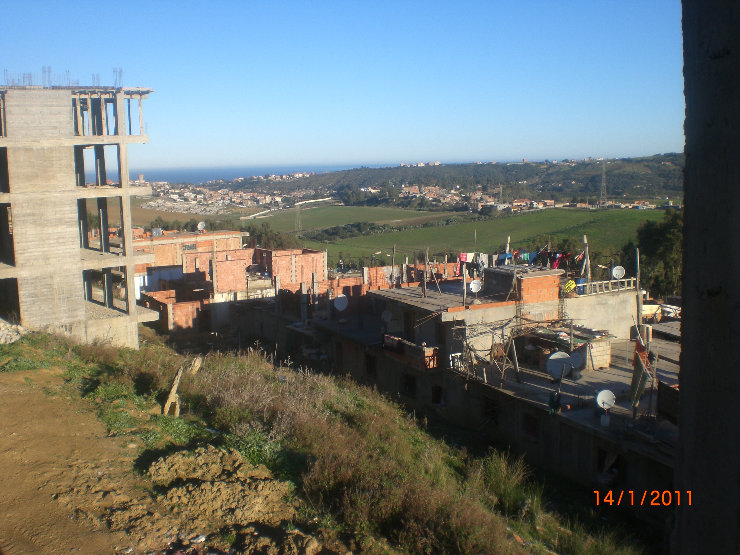 vu sur la mer de puis tidjelabine